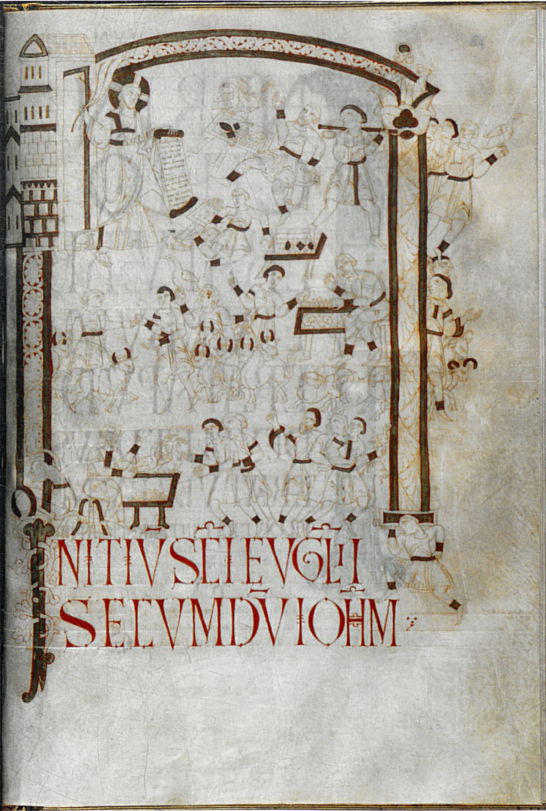 Evangeliar der Mathilde von Tuszien, San Benedetto Po (al Polirone), vor 1099. New York, The Pierpont Morgan Library, MS M.492 fol. 84r. Purchase by Pierpont Morgan, 1911.